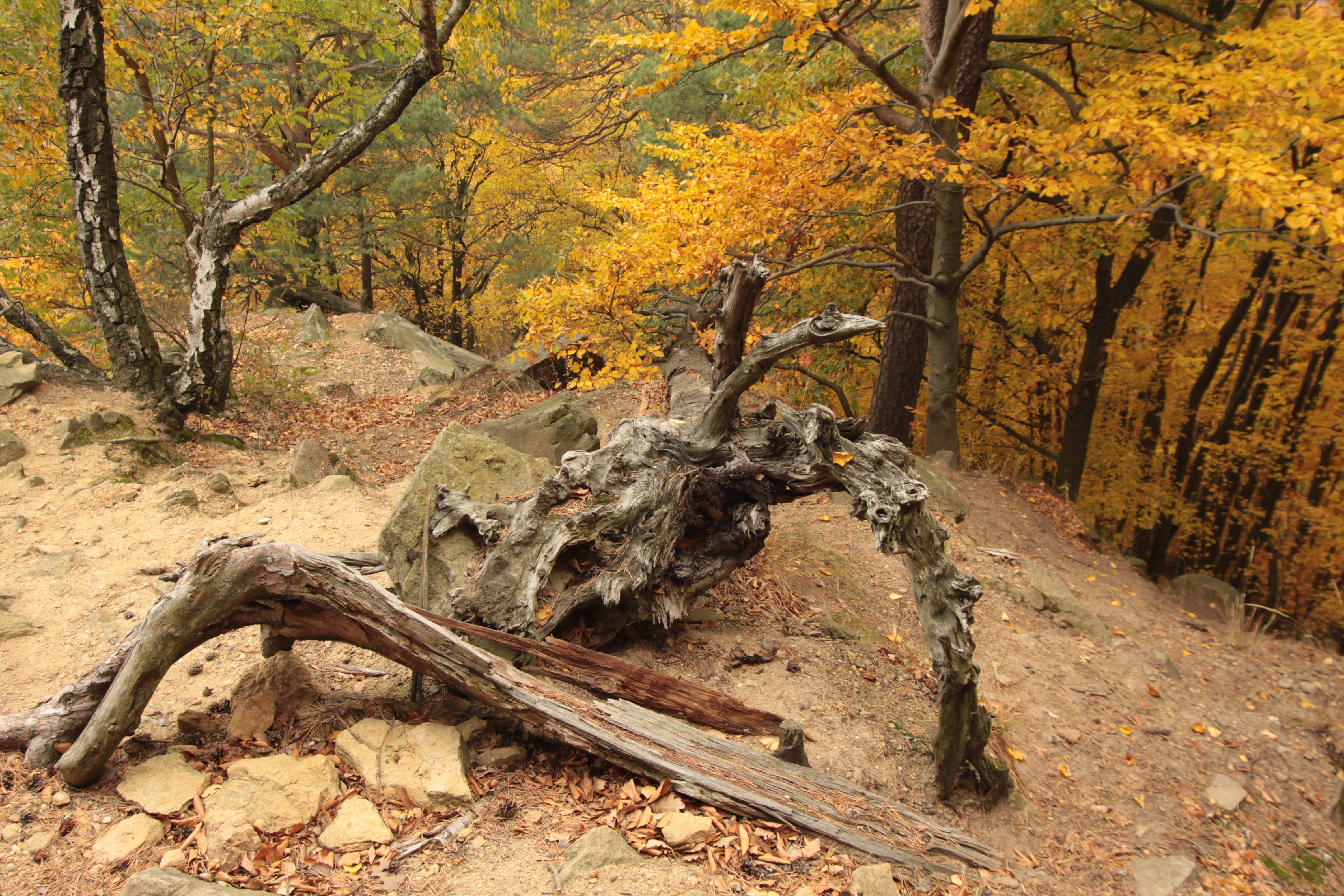 sešlap v okolí skály